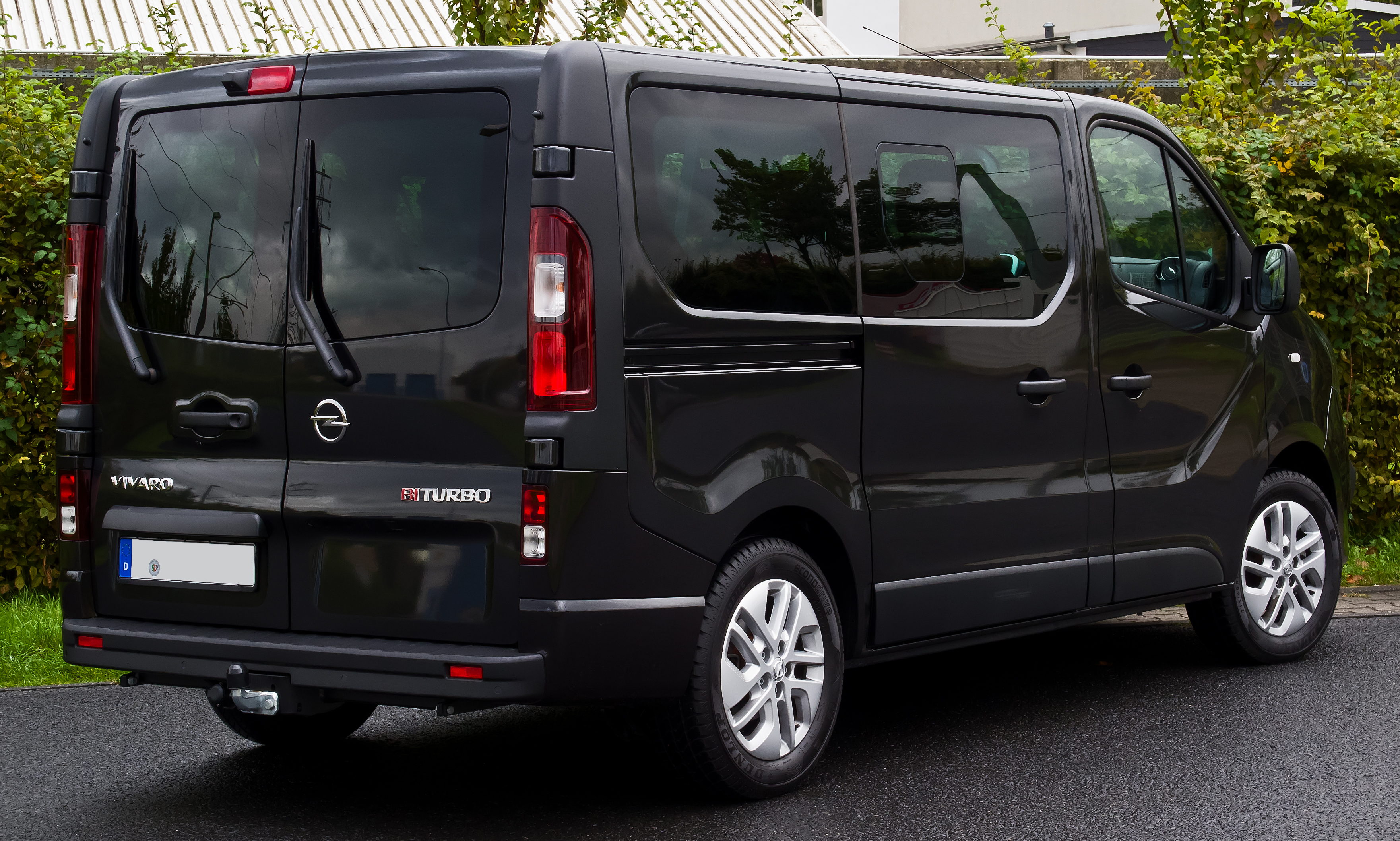 Opel Vivaro Combi 1.6 BiTurbo CDTI ecoFLEX (B)